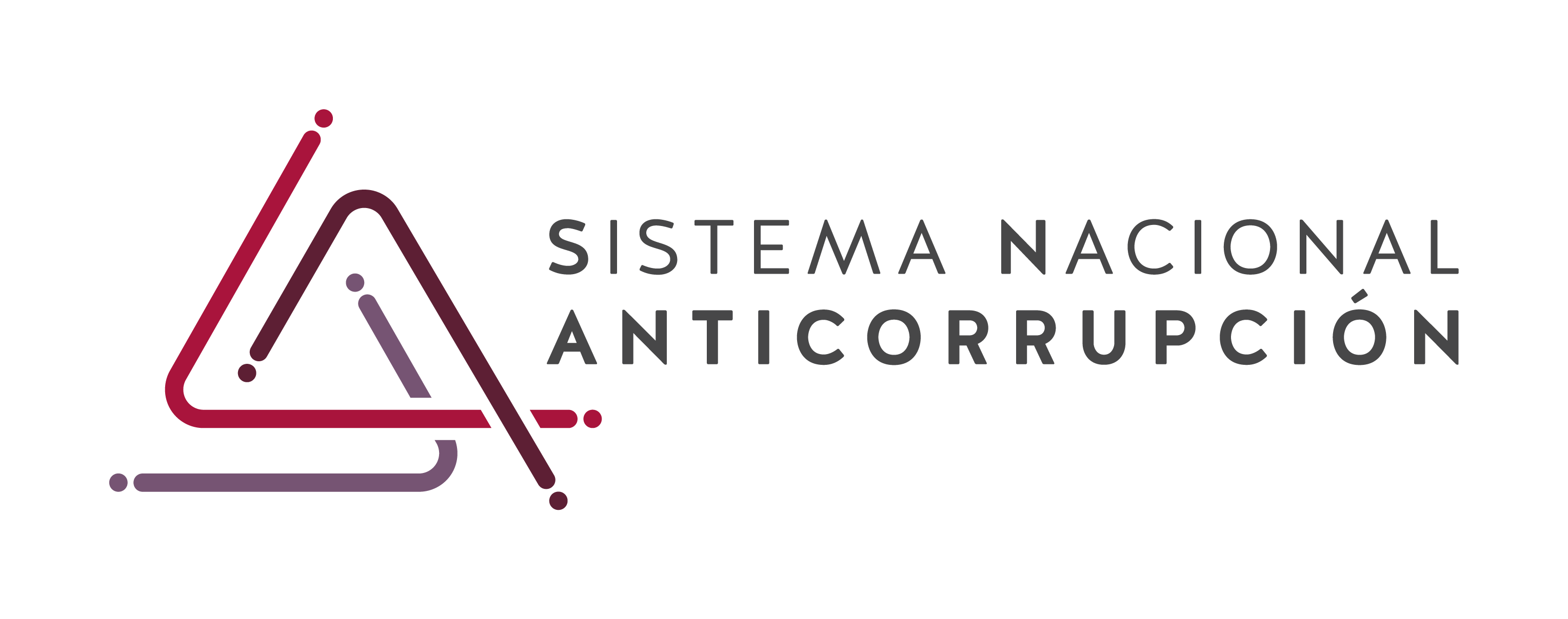 solicitud de logo